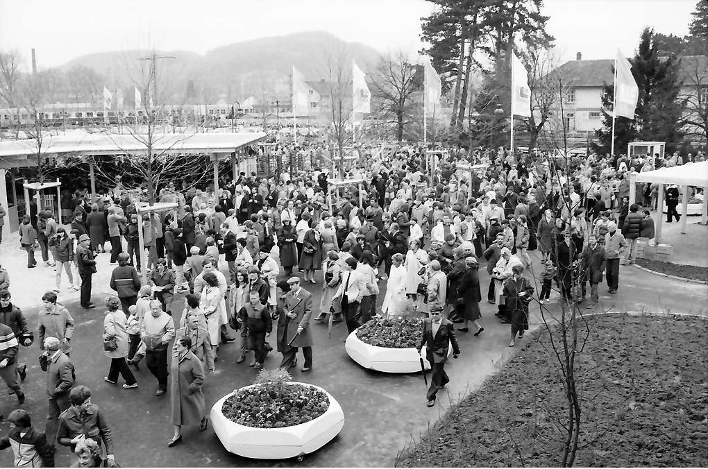 Lörrach: Landesgartenschau, Eröffnung; Publikum im Eingang zur Gartenschau